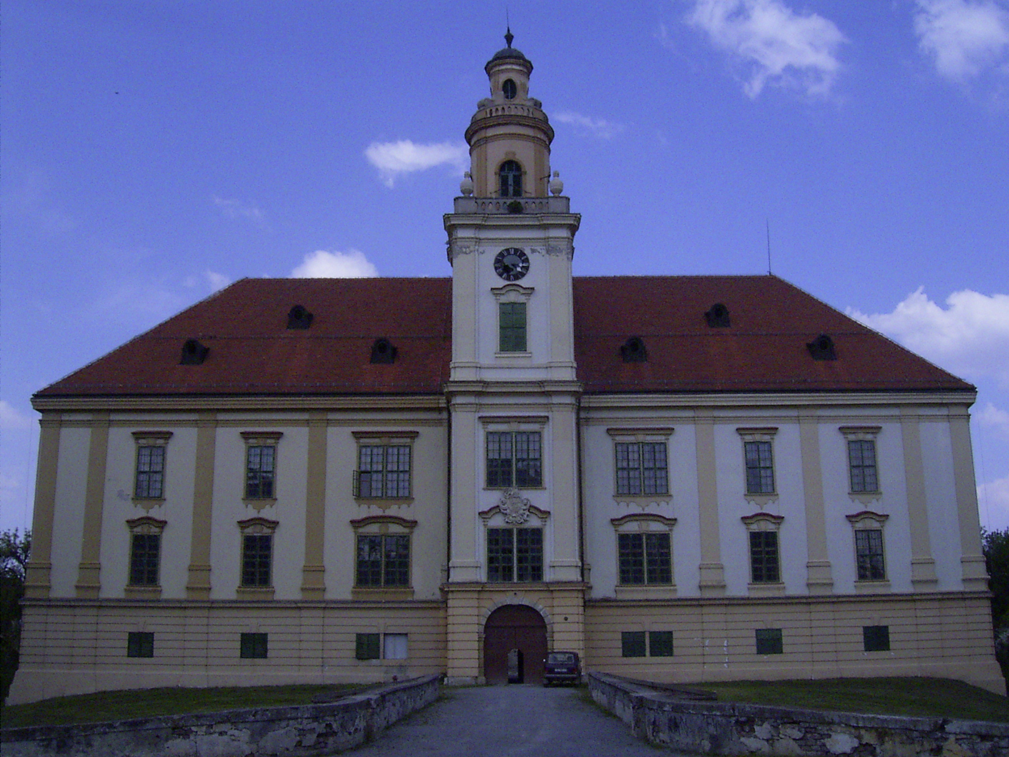 Schloss, Valpovo, Kroatien